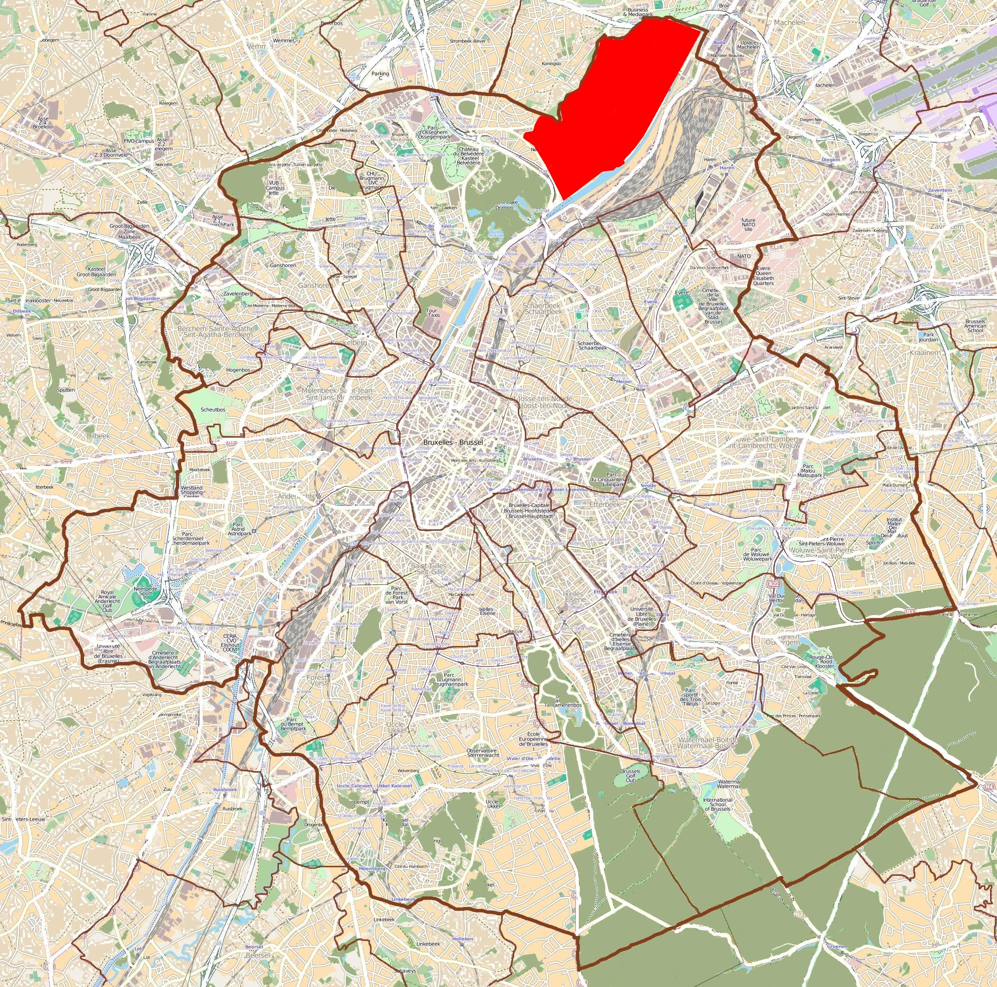 Carte de Neder-Over-Hembeek : Zone du code postal 1120